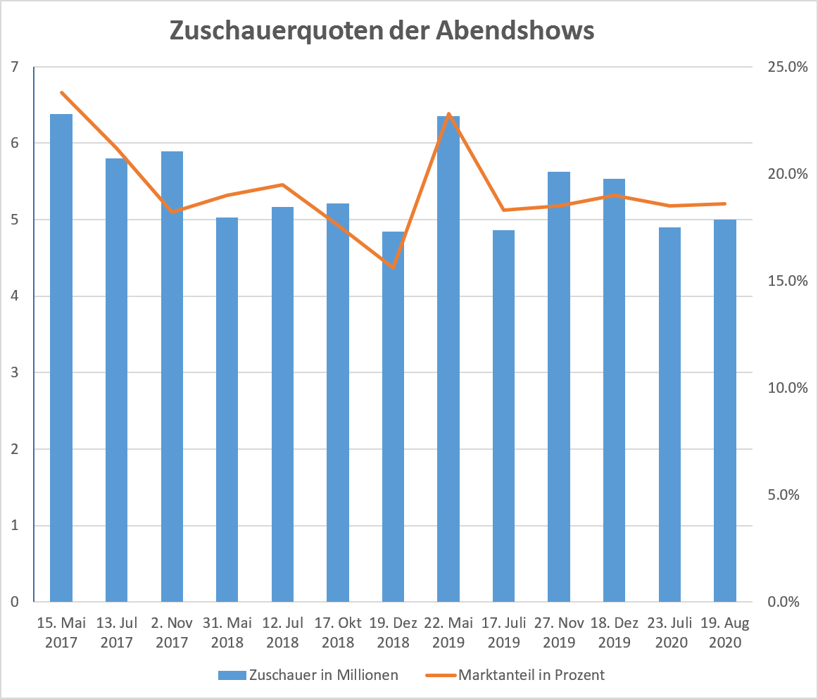 Zuschauerquoten der BfR-Abendshows, Stand 20. August 2020